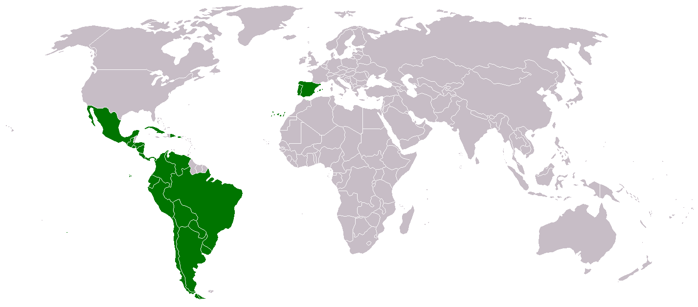 Mapa de Iberoamerica